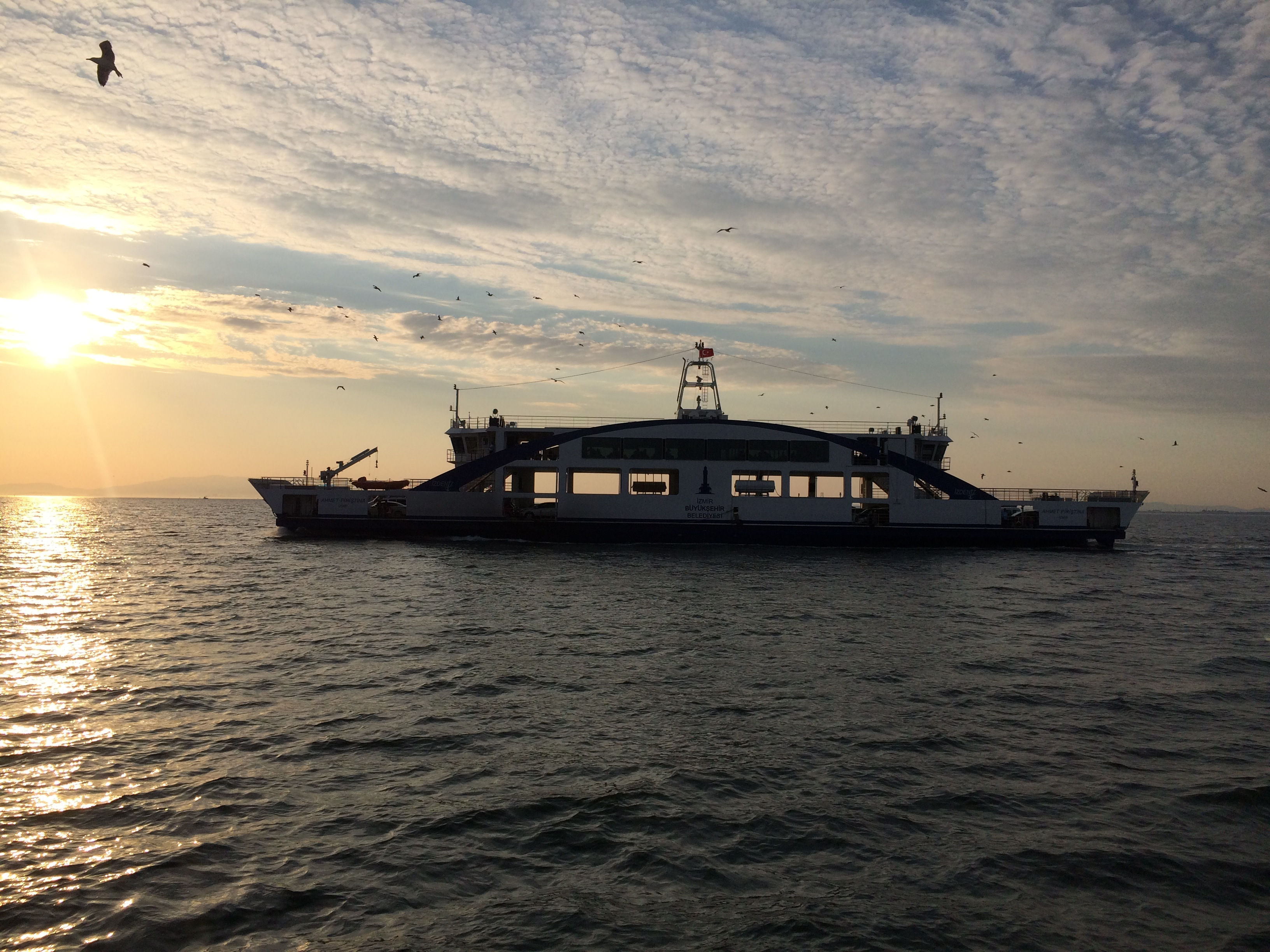 İzmir iç hat seferlerinde kullanılan Ahmet Piriştina'nın ismi verilen arabalı vapur.